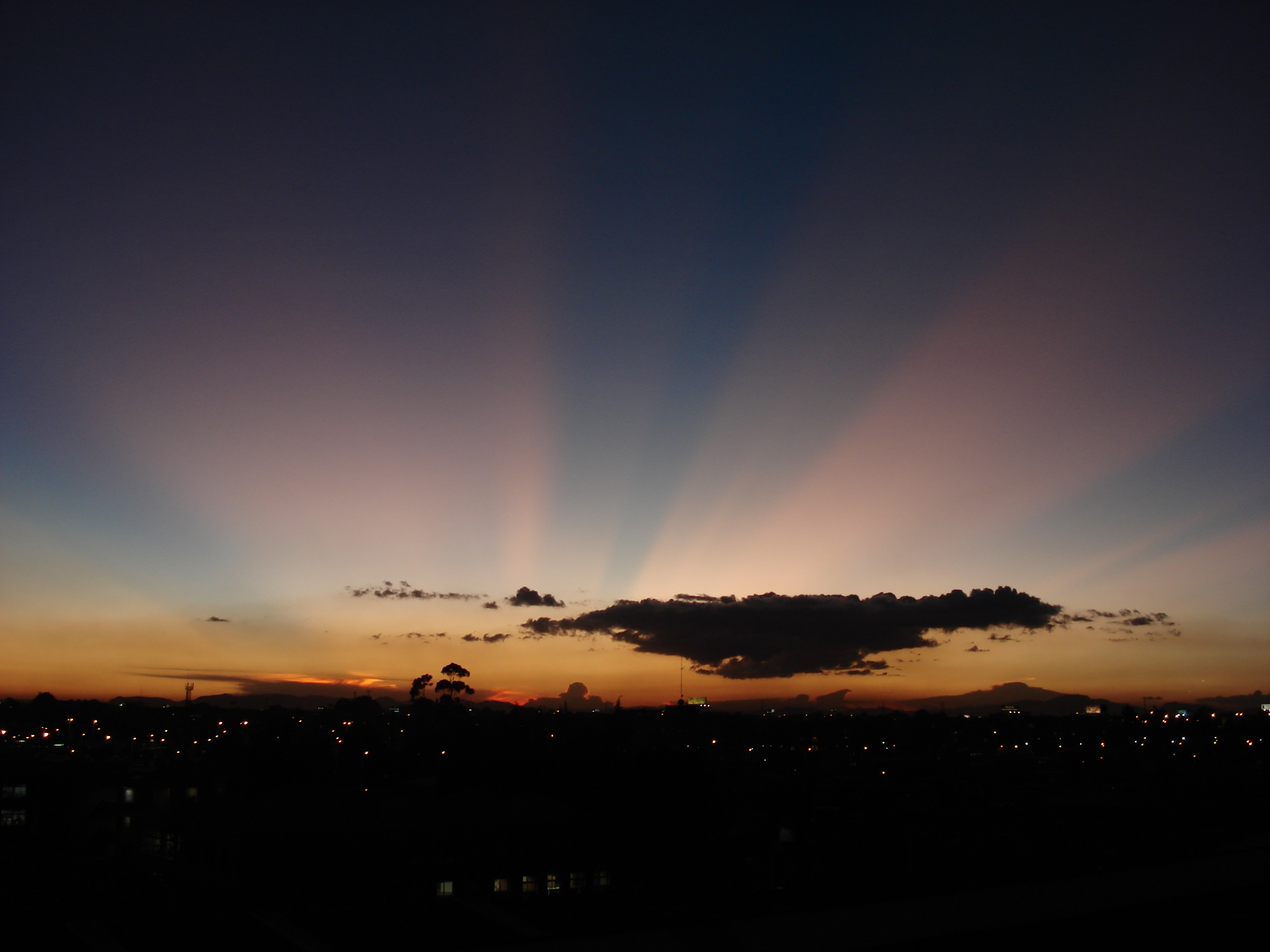 Toma de atardecer en el sector de la floresta, Bogotá